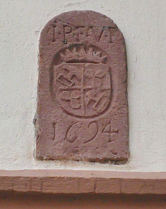 Das Wappen mit Initialen "IPFVF" (Johann Philipp Freiherr von Frankenstein) und der Jahreszahl 1694 auf des Ostseite des Westfügels zum Innenhof.